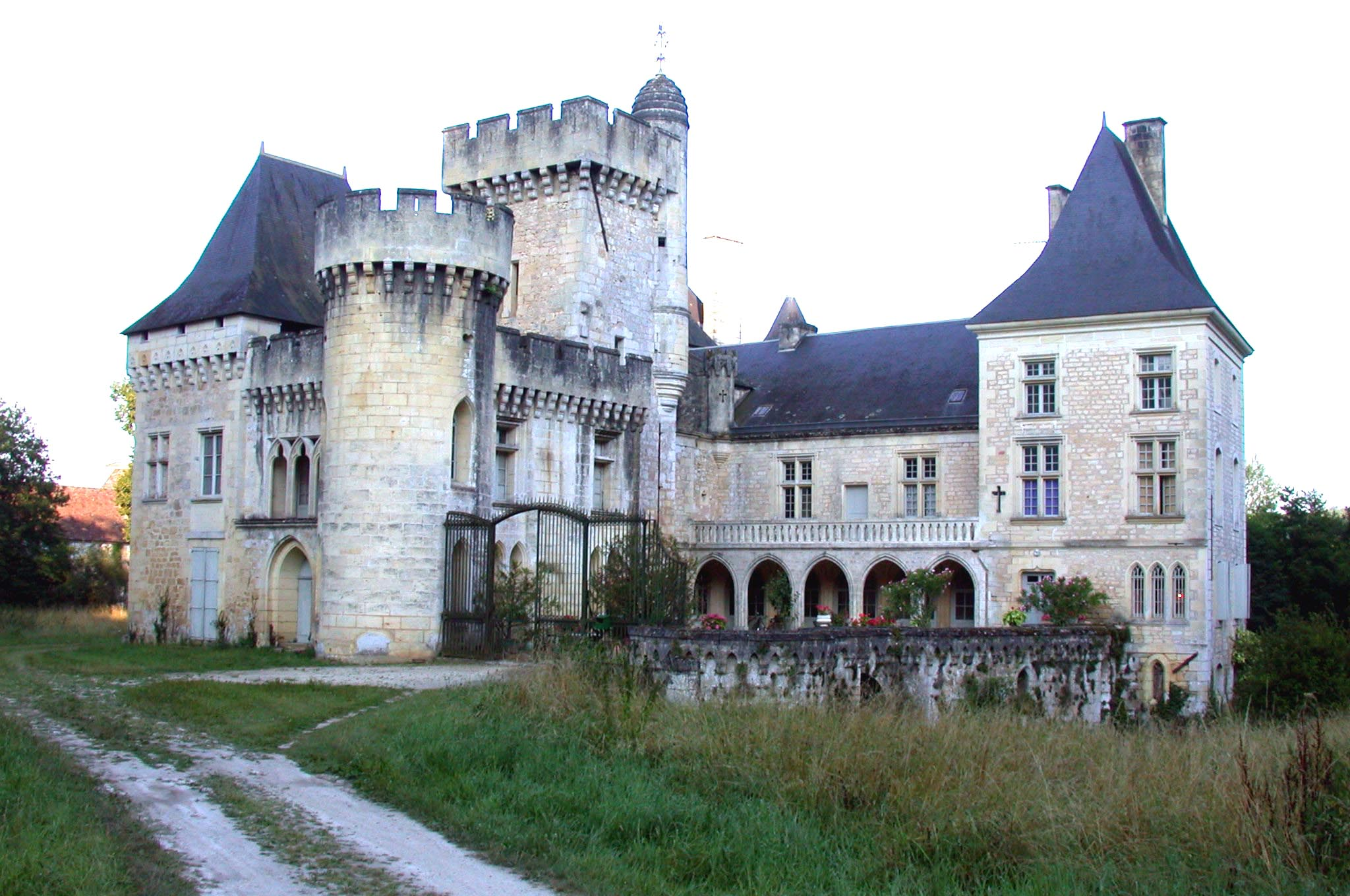 Château de Campagne, Dordogne .